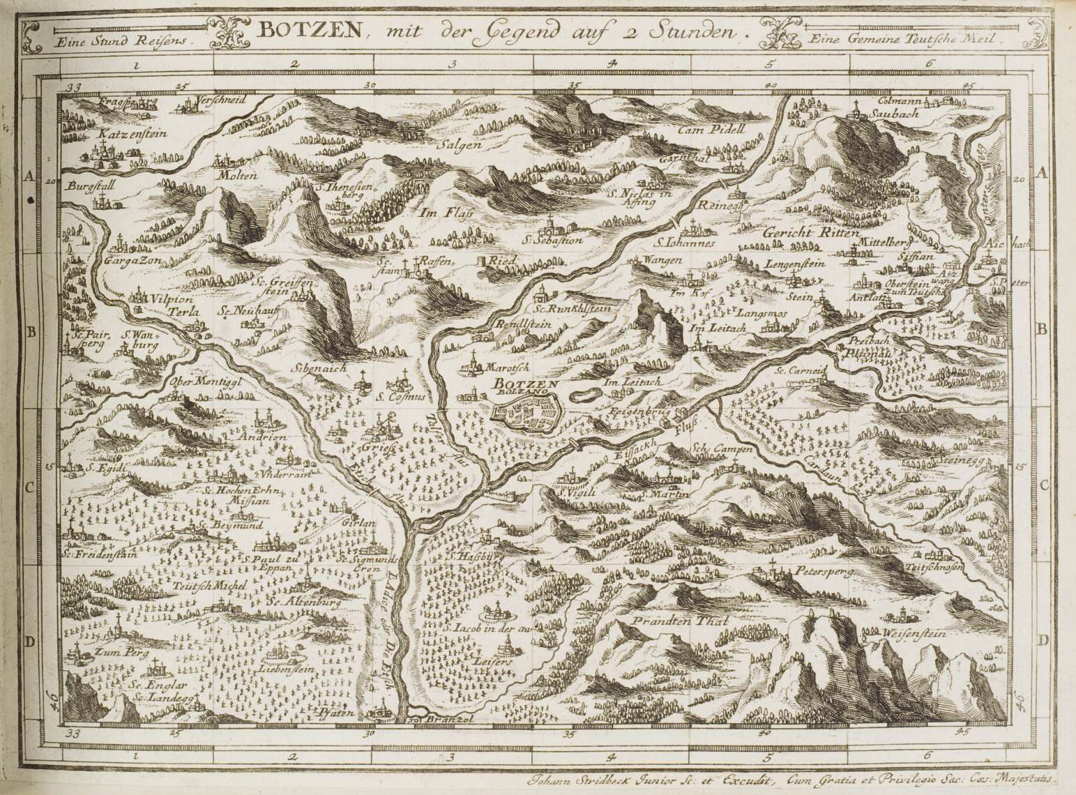 Curioses Staats und Kriegs Theatrum Dermahliger Begebenheiten im Tyrol : durch Unterschiedliche Geographische, Hydrographische, Topographische, Chronologische, Genealogische, Historische &c. Carten, Abrisse, und Tabellen Erlaeutert, Augspurg : Stridbeck, [ca. 1700] Botzen mit der Gegend auf 2 Stunden